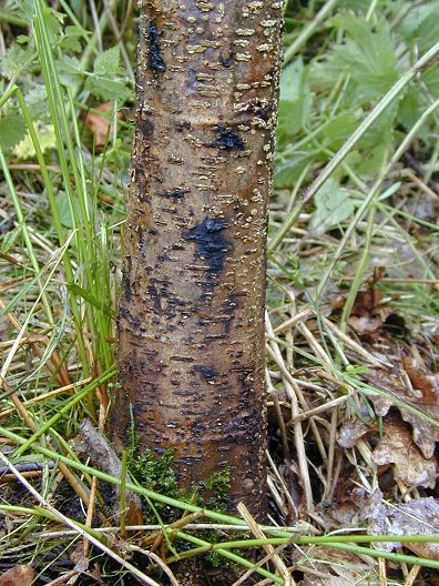 Symptome des Erlensterbens durch Phytophthora alni, Schleimfluss an Erle (Alnus glutinosa)